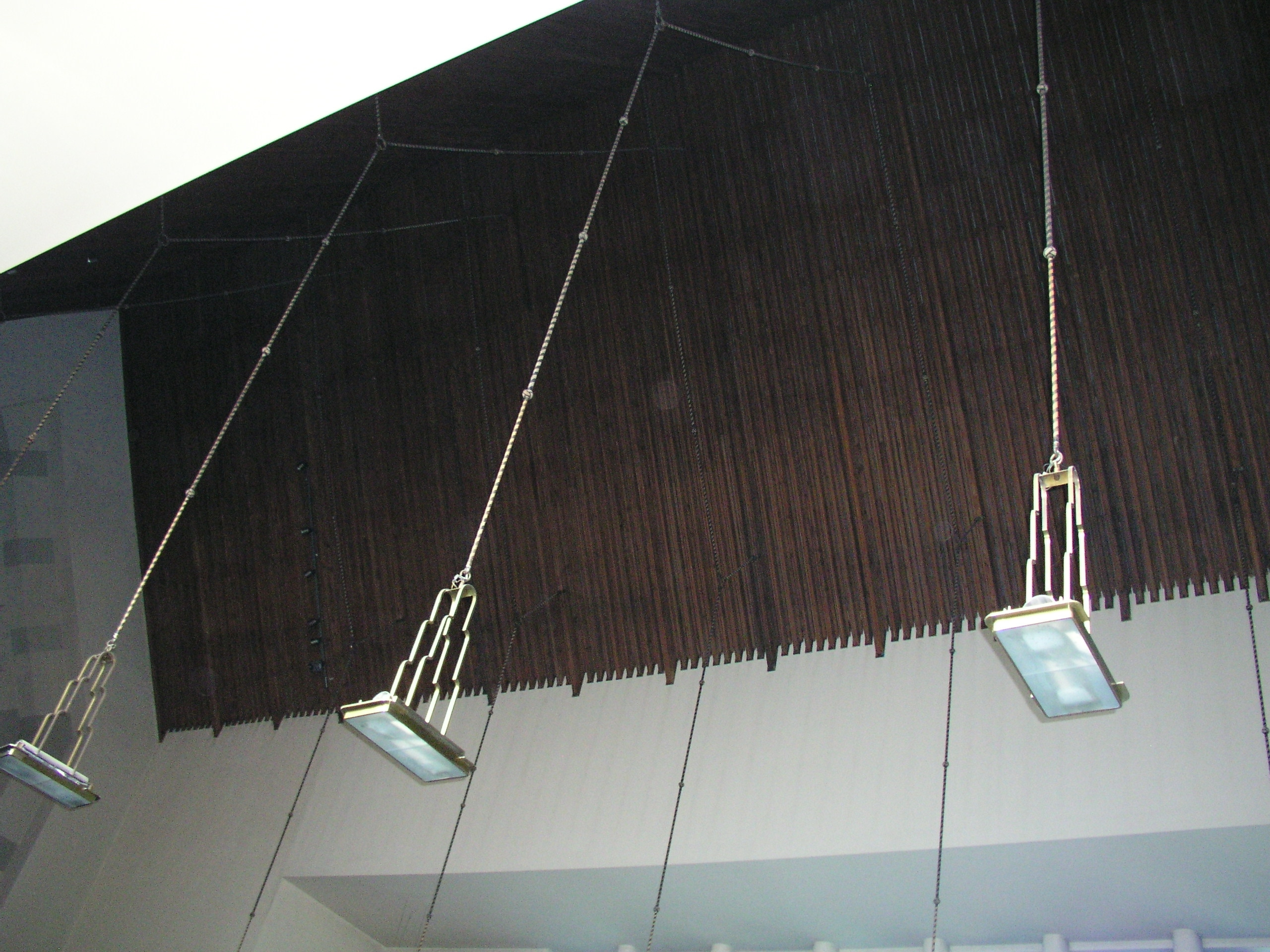 Deckendetail der JCK (2)